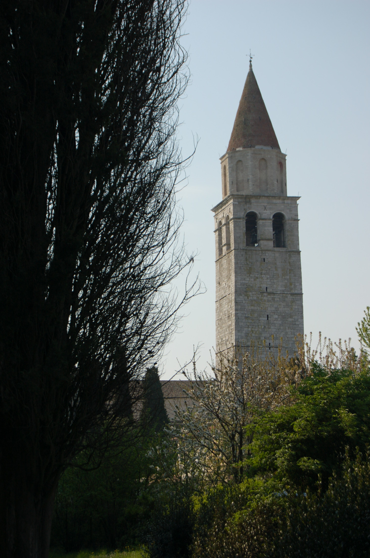 Campanile Basilica di Aquileia visto dal porto antico